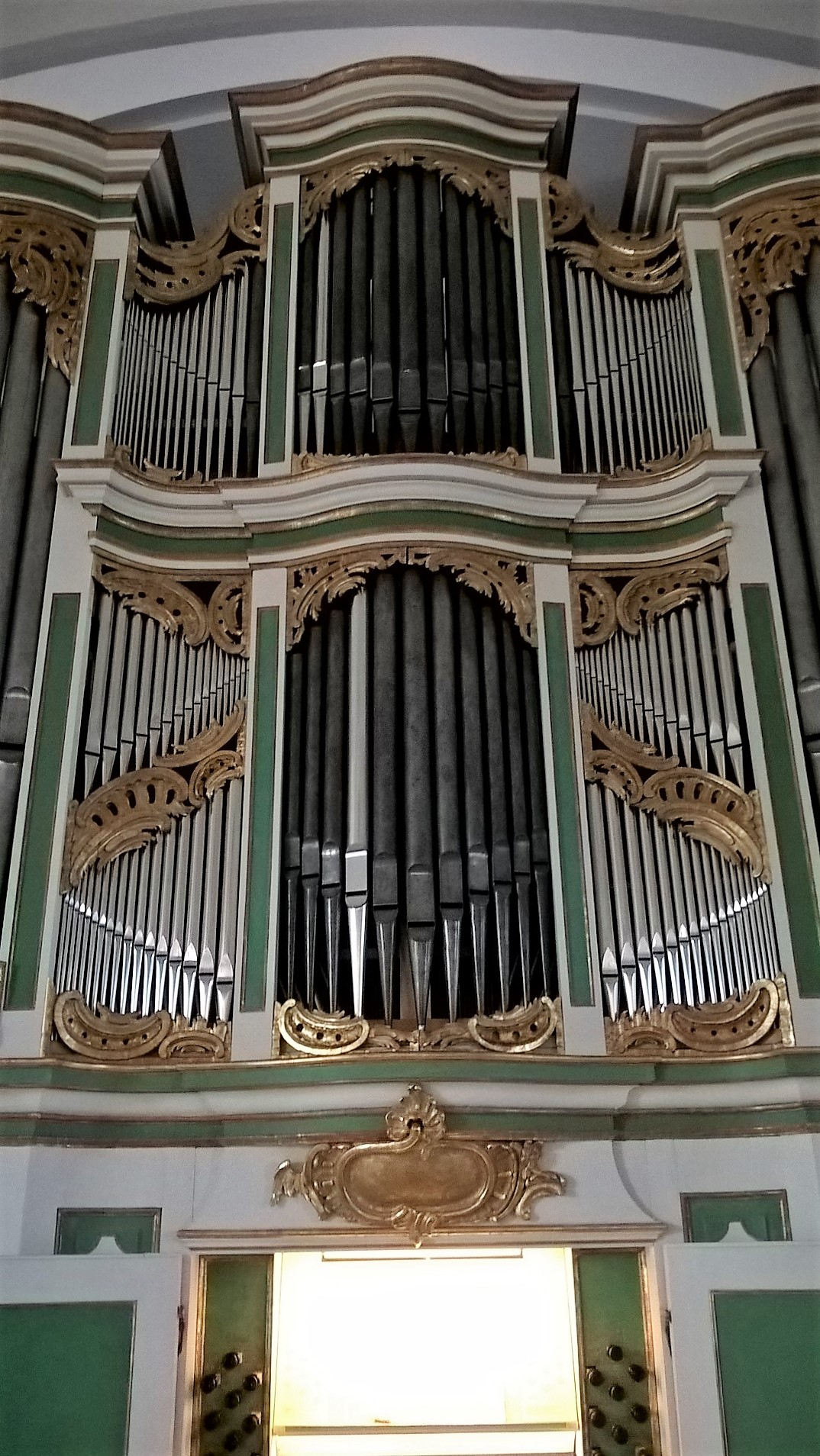 Orgel der Kirche Zur Frohen Botschaft, Berlin-Karlshorst, Deutschland